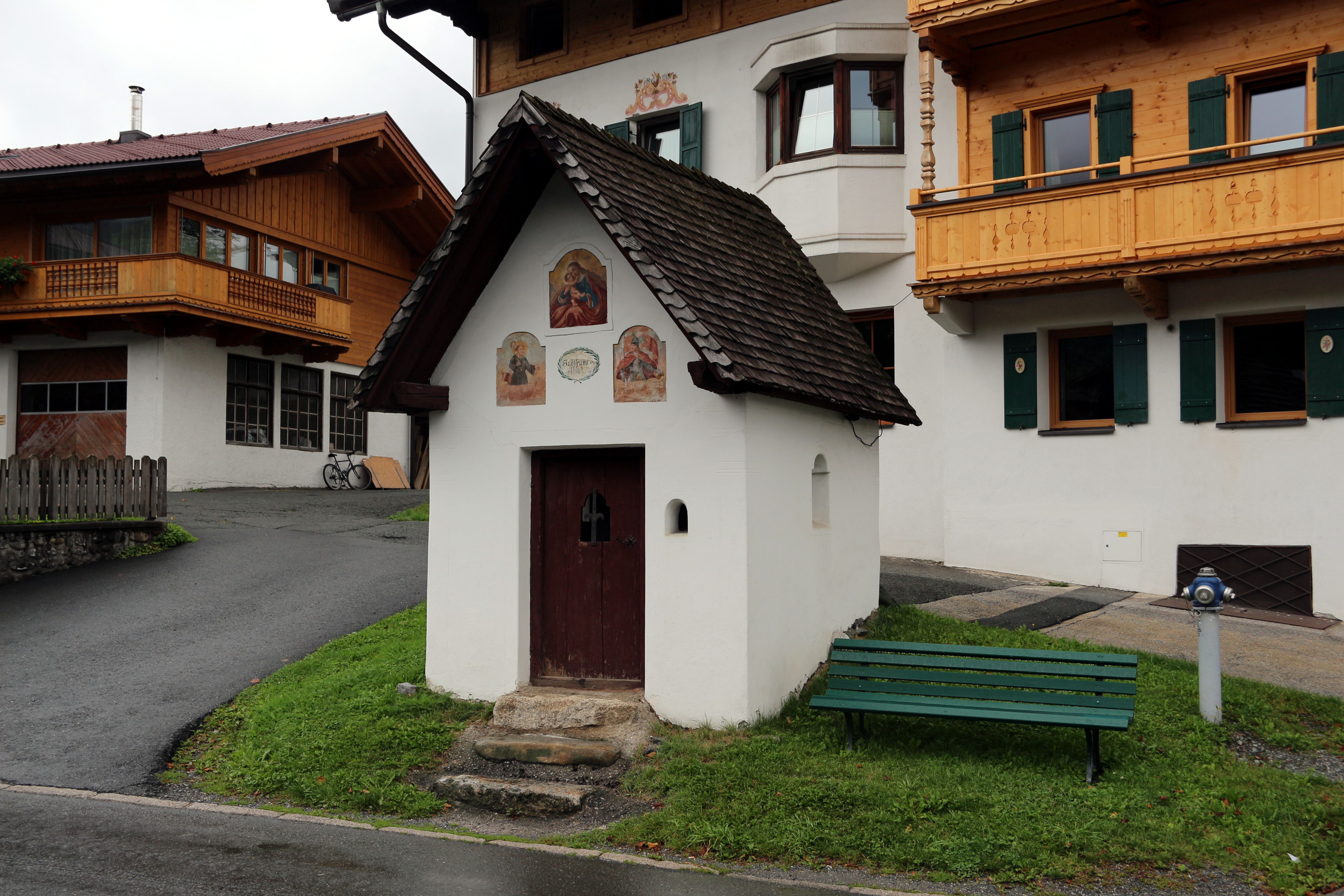 Dorfwirtskapelle in Going, Tirol. Erbaut in der 2. Hälfte des 17. Jahrhunderts. This media shows the remarkable cultural object in the Austrian state of Tyrol listed by the Tyrolean Art Cadastre with the ID 6695. (on tirisMaps, pdf, more images on Commons, Wikidata)